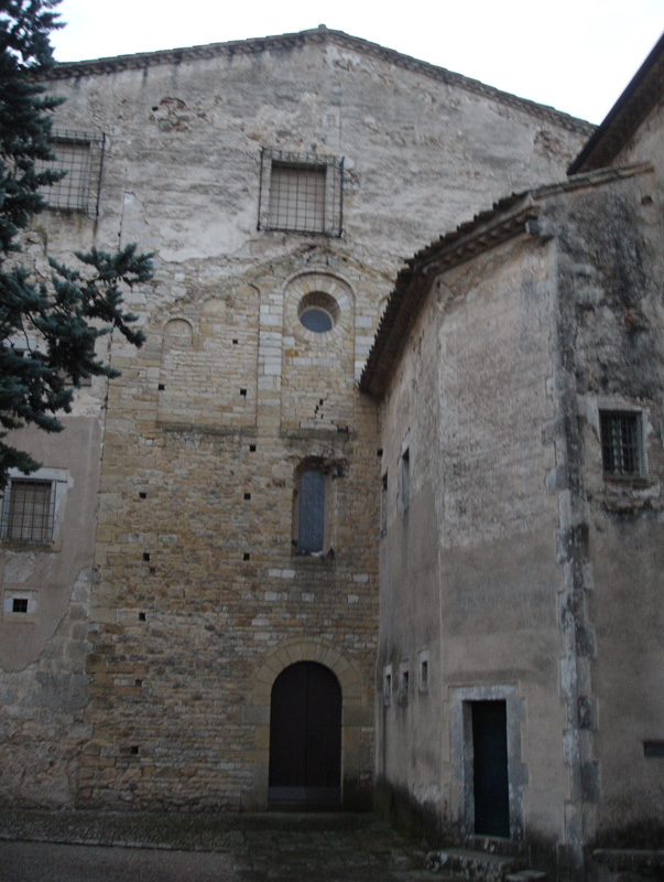 Monestir de Sant Daniel (Girona, Catalunya, Espanya)